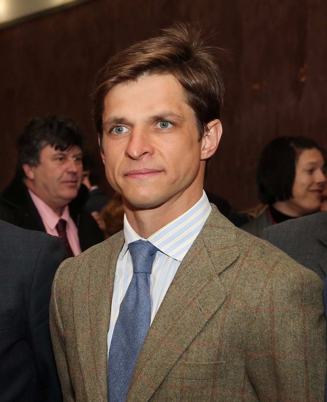 "Juli" famoso torero